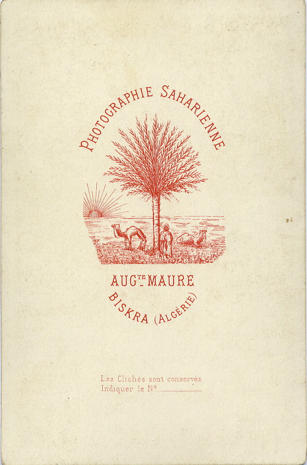 Dos de photos d'Auguste Maure